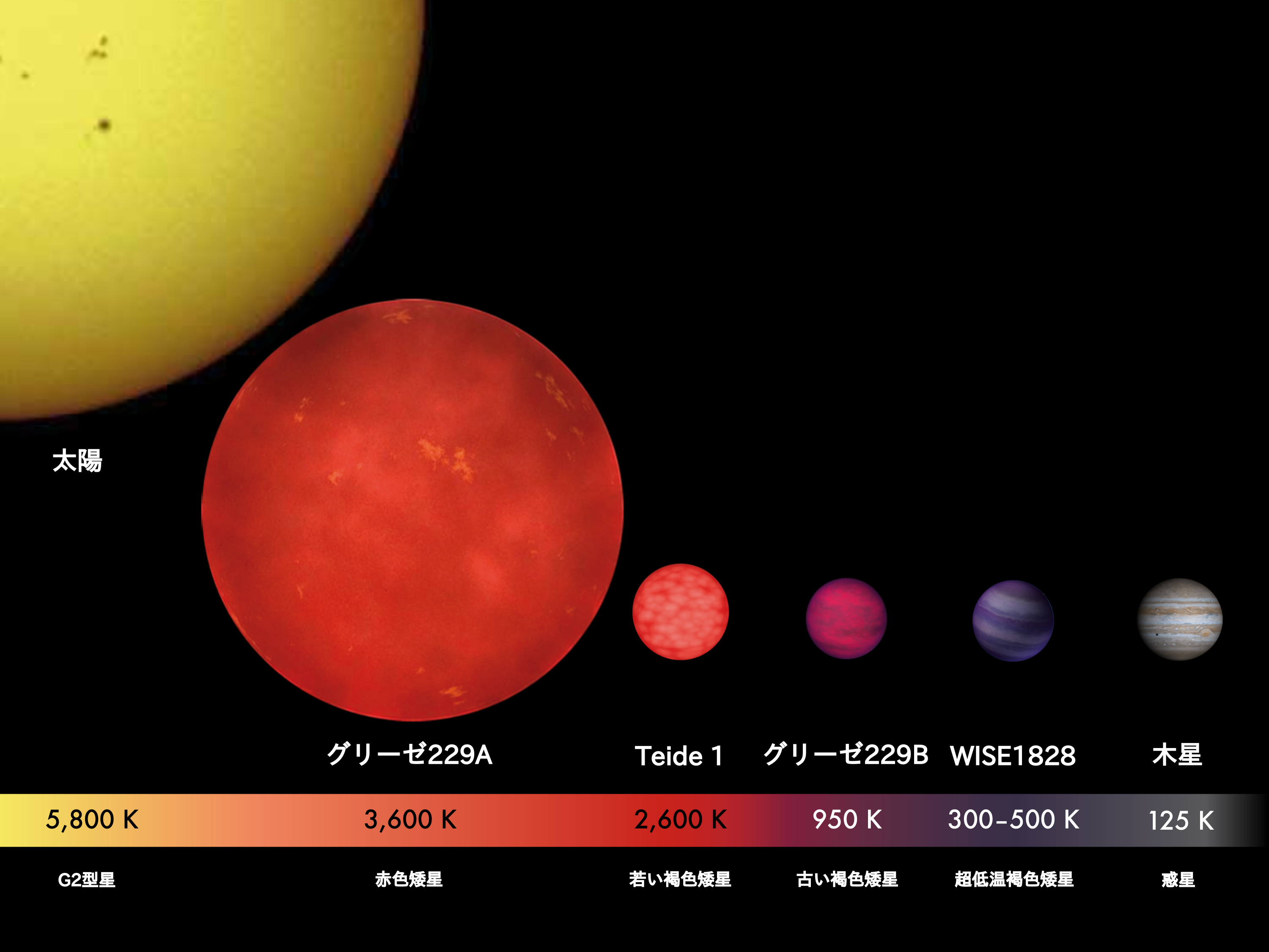 惑星、褐色矮星、恒星の大きさ比較。太陽、赤色矮星グリーゼ229A、褐色矮星Teide 1、グリーゼ229B、WISE 1828+2650、木星を図示する。太陽、木星はNASAの衛星による画像、他はNASAの想像図。